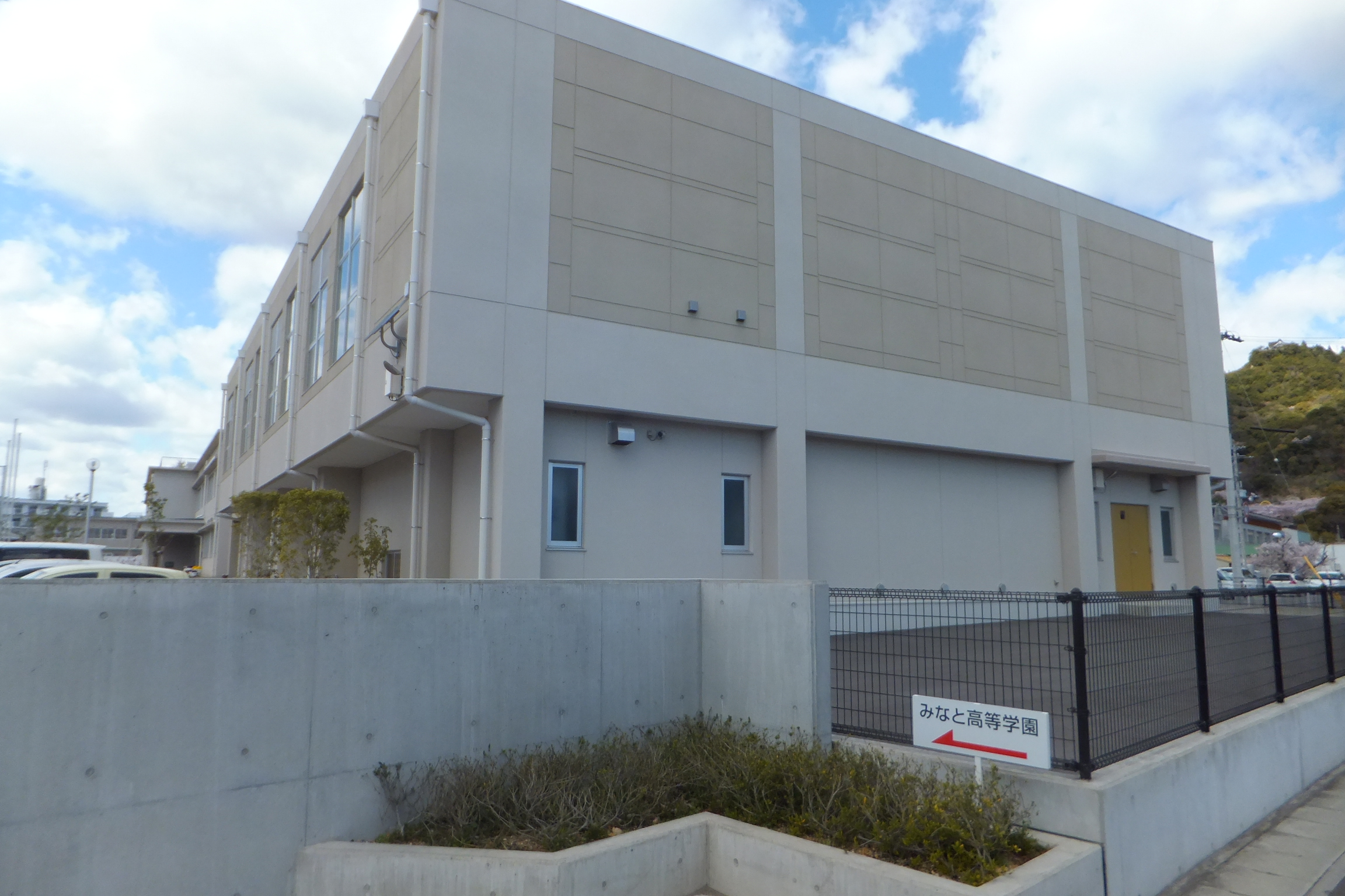 徳島県立みなと特別支援学校